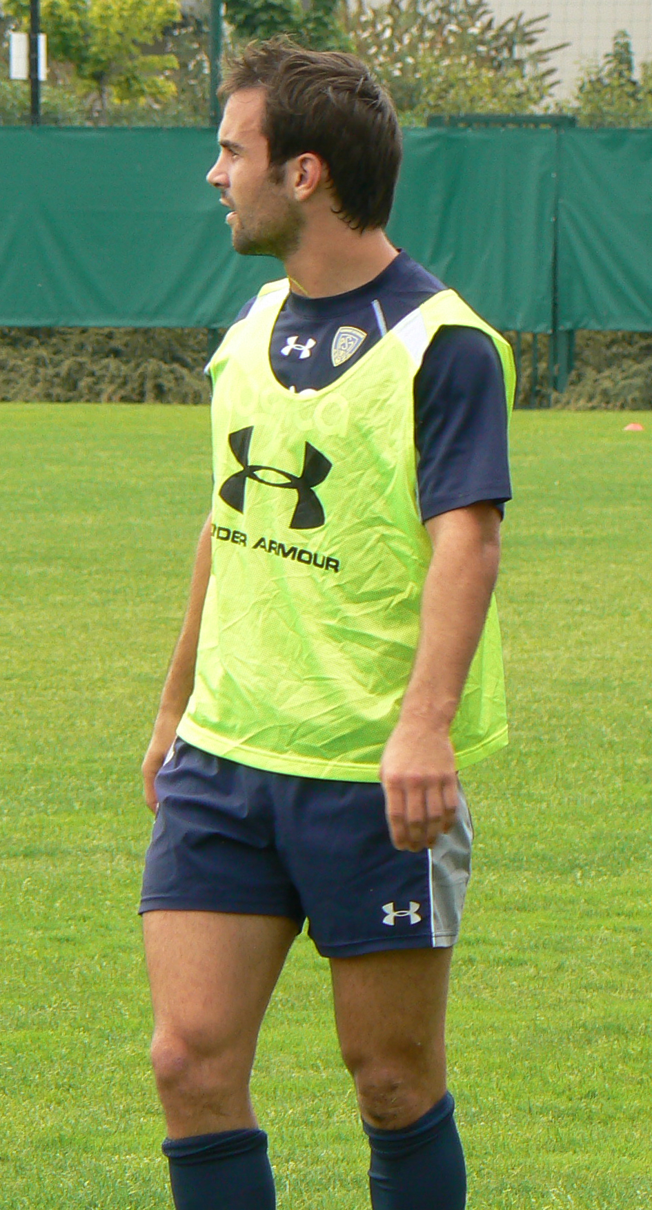 Le rugbyman international français Morgan Parra lors d'un entraînement avec l'ASM Clermont Auvergne